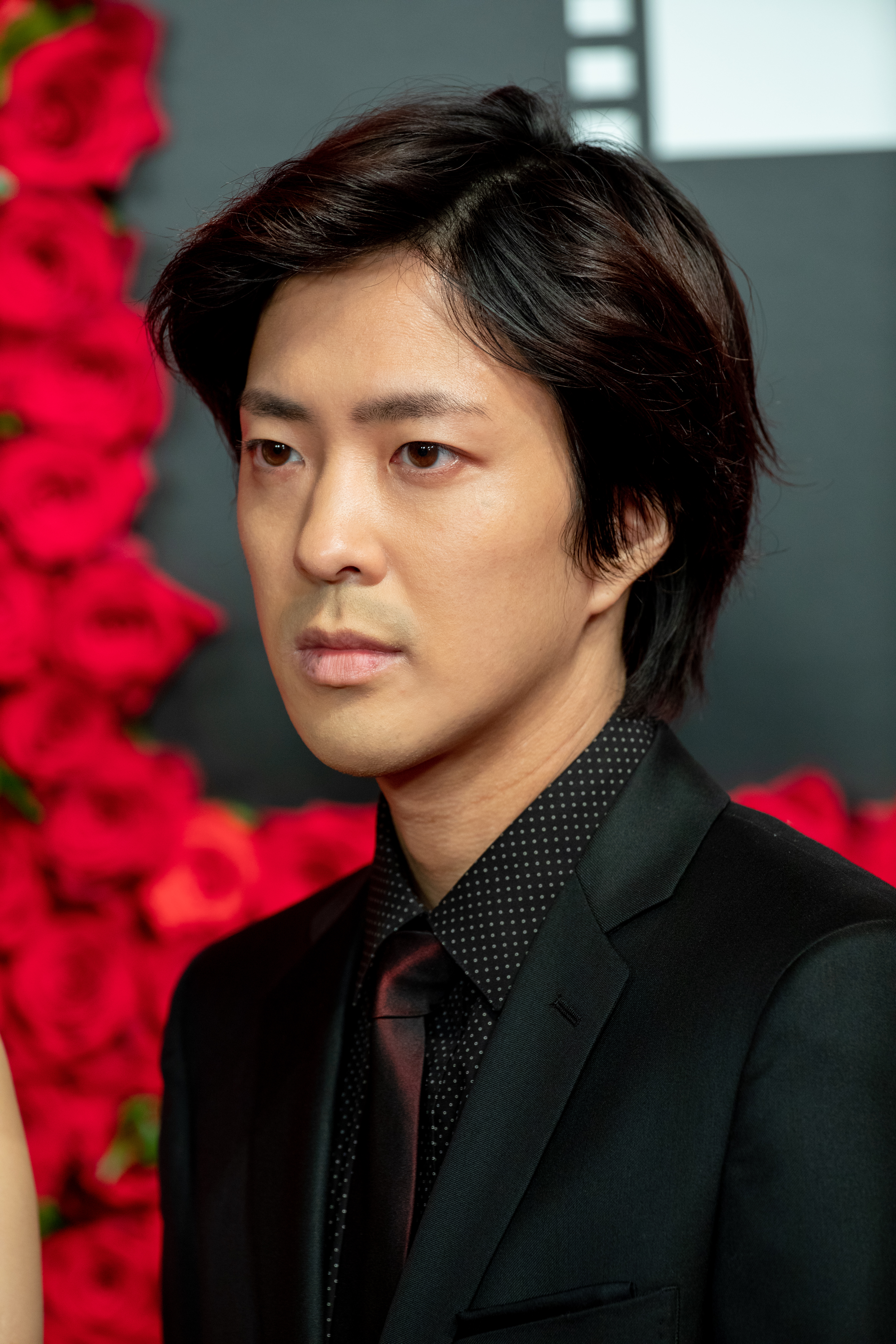 第30回 東京国際映画祭 オープニングセレモニー 若葉竜也 (愛がなんだ)